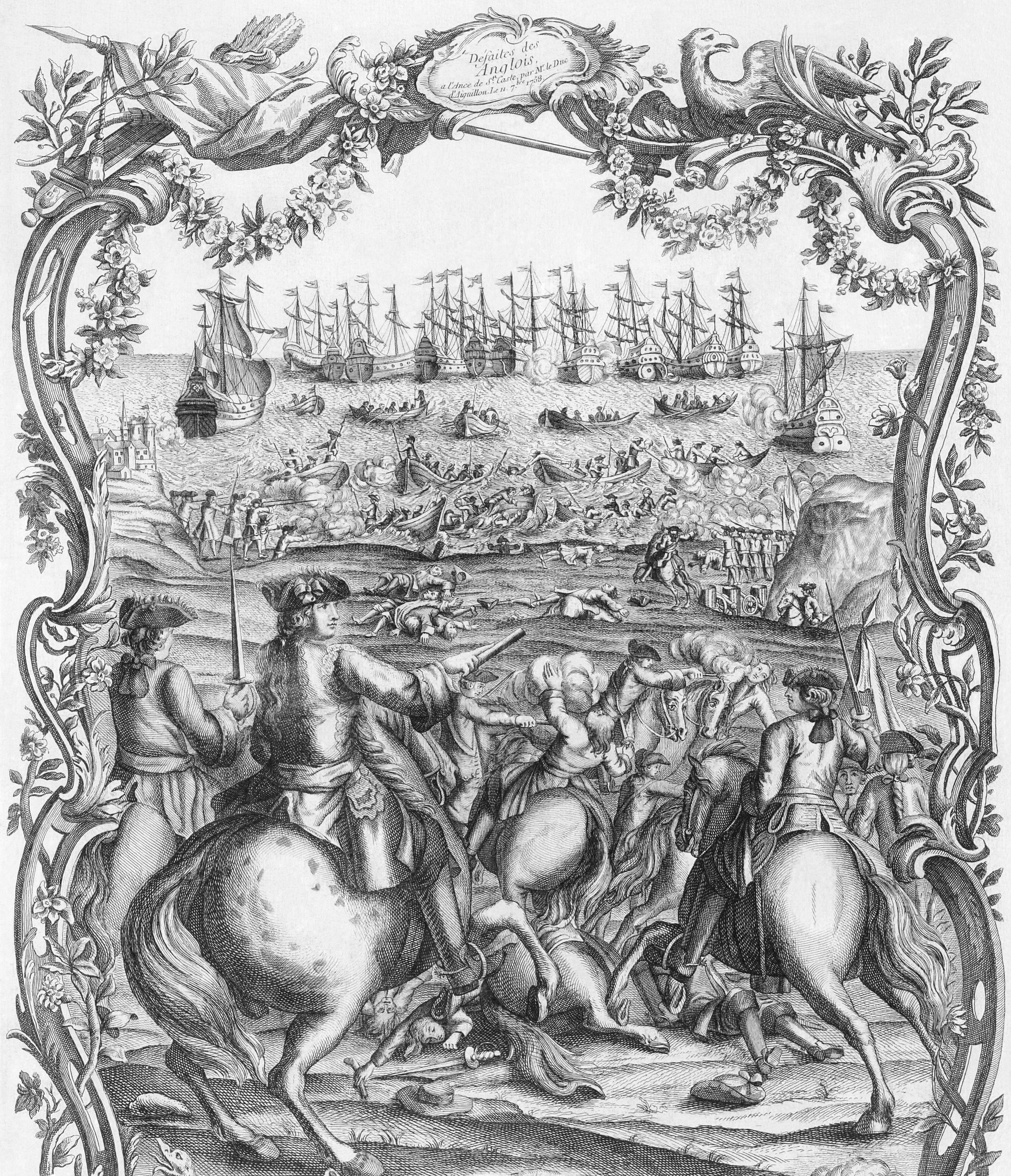 Defaites des Anglois à l'Ance de St Caste par Mr le duc d'Aiguillon le 11 septembre 1758